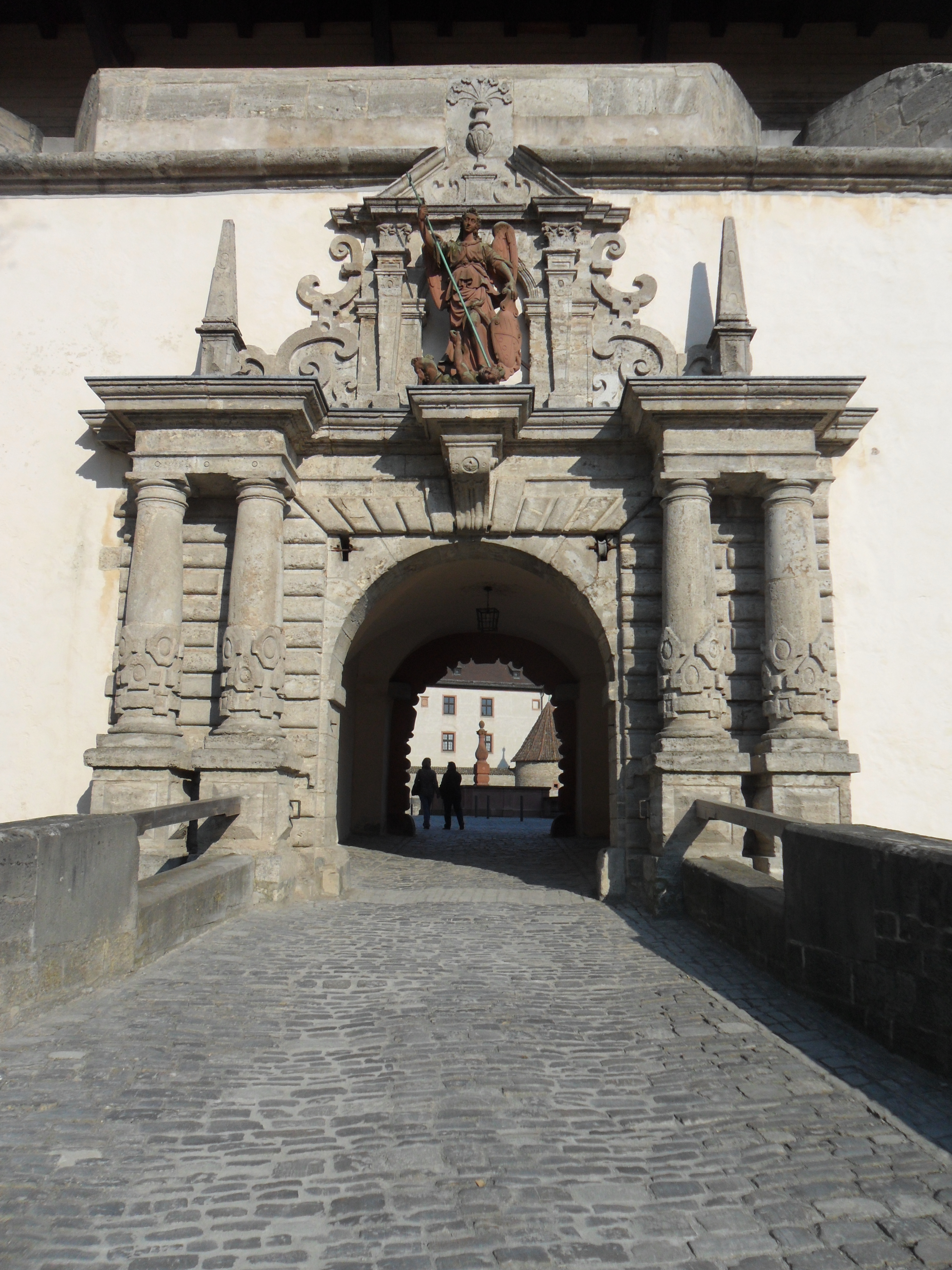 siehe Bildtitel